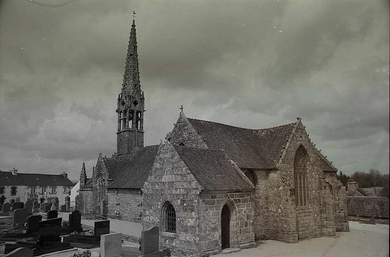 Iliz Itron Varia Brenniliz, denez goasguen.